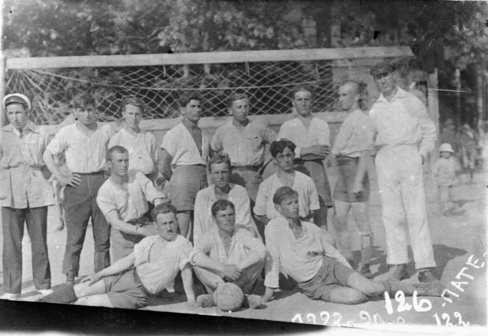 Bakı-Tbilisi futbol komandalarının görüşu